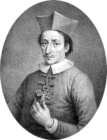 Niels Steensen (da) - Nicholas Steno (1638 - 1686) var en pioner både indenfor anatomi og geologi. - Danish Scientist